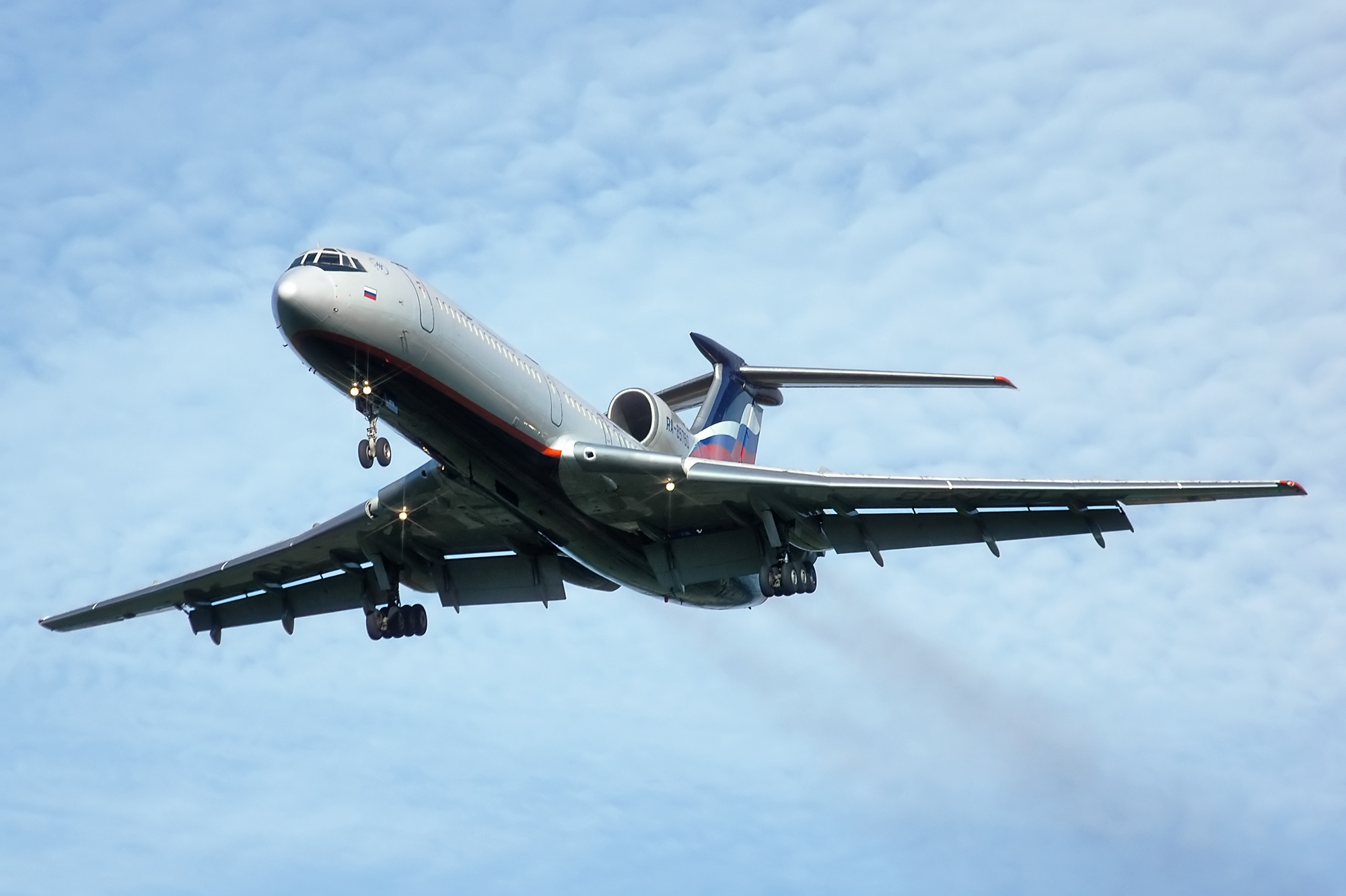 Tupolev Tu-154